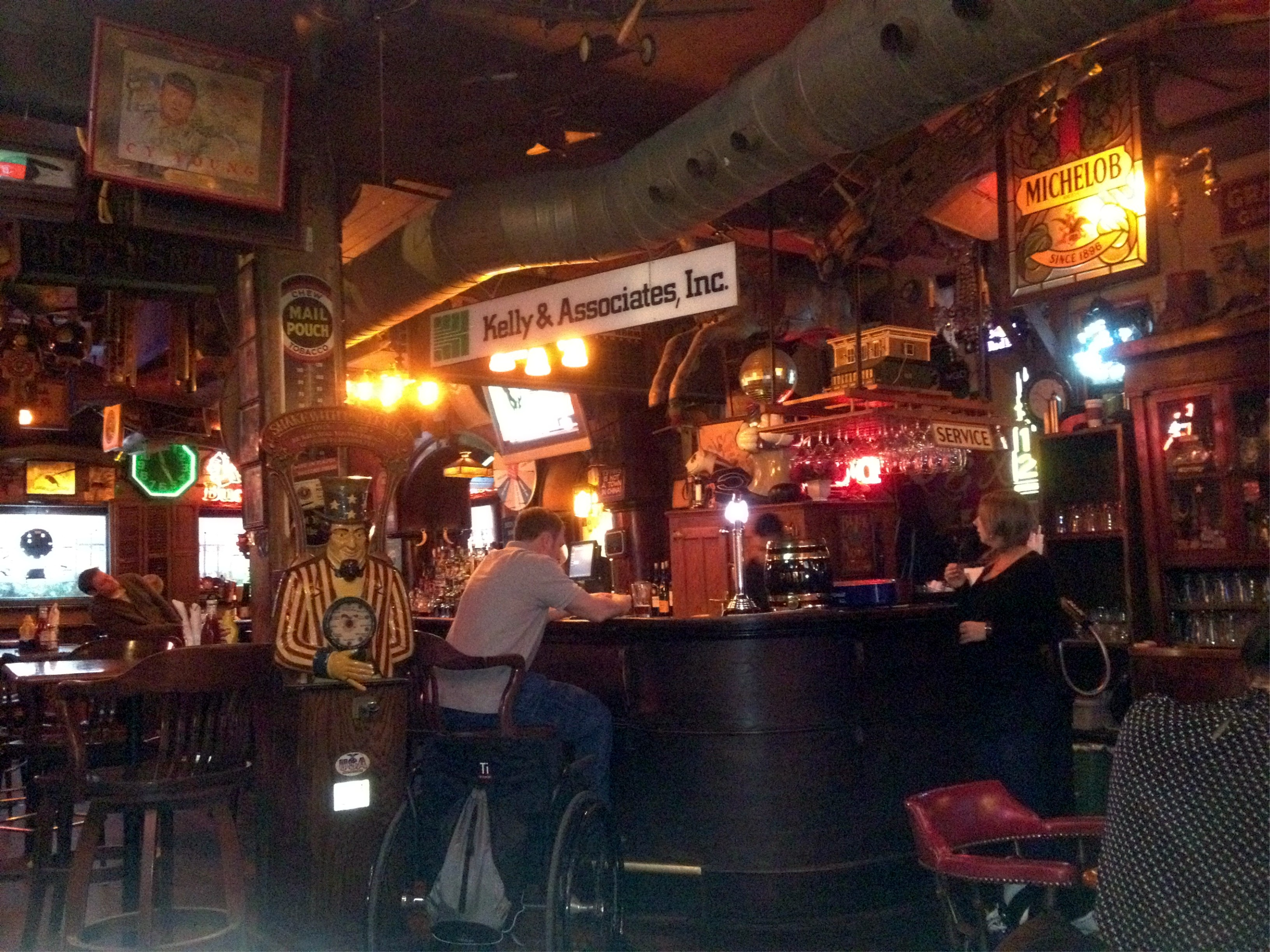 20120214 02 Green Door Tavern